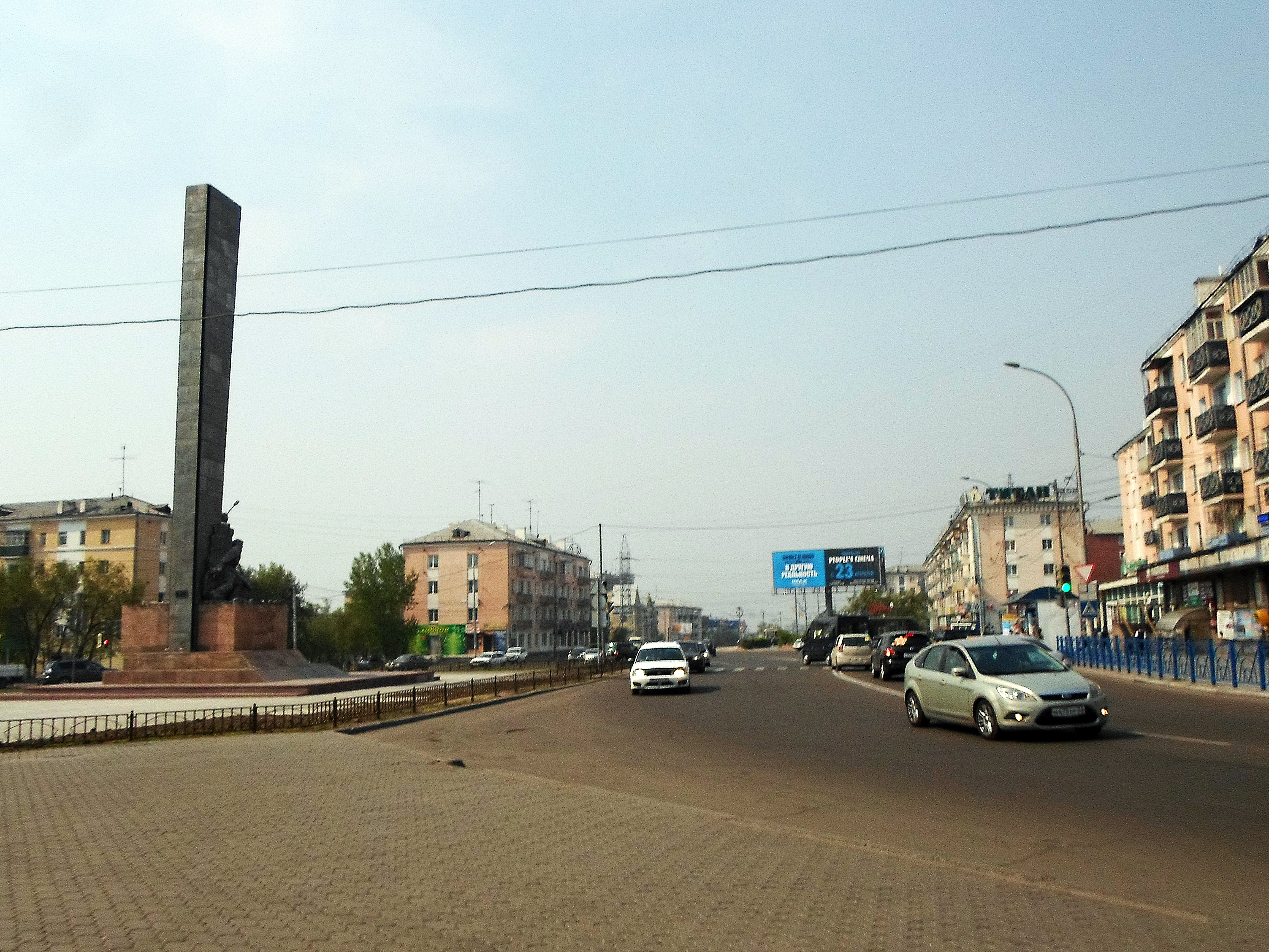 Комсомольская площадь. Памятник воинам Бурятии. Вид на юго-запад проспекта 50-летия Октября.